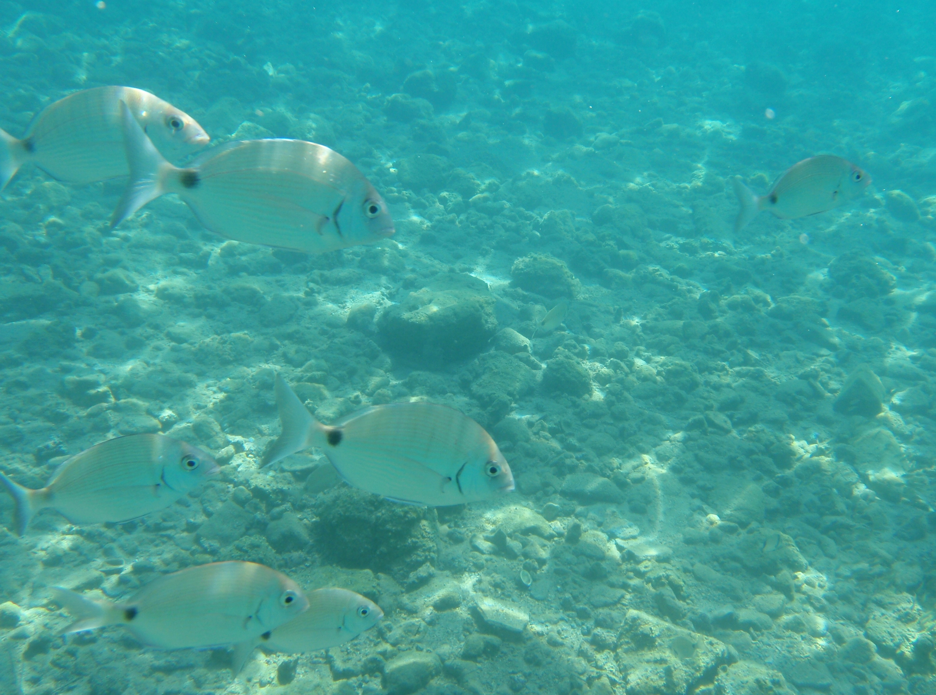 Fethiye'de bir koyda çekilen oblada melanura.